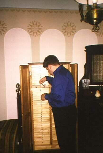 tagen av uppladdaren